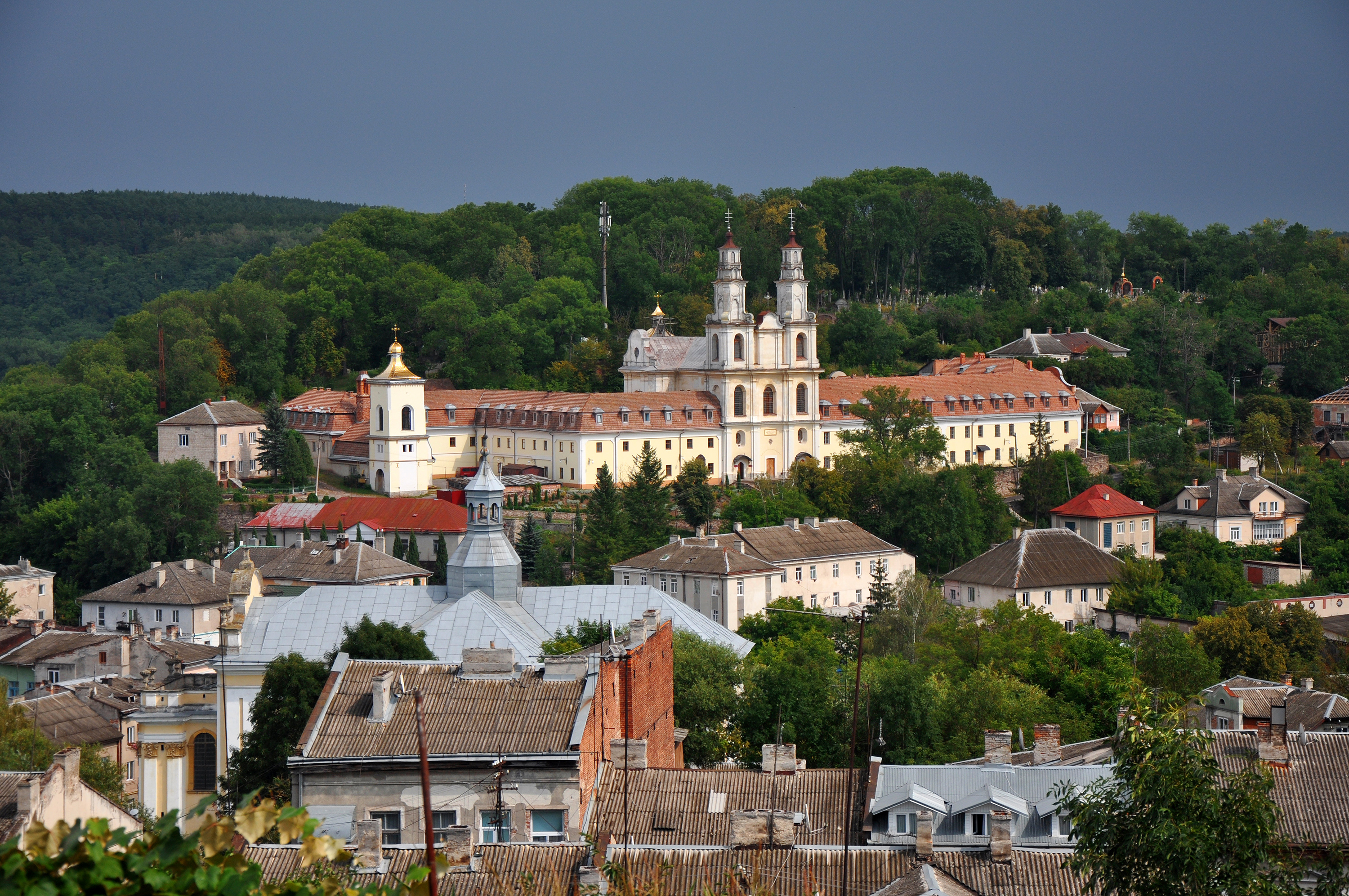 Василіянський монастир (мур.), Бучач, вул. А. Міцкевича, 19